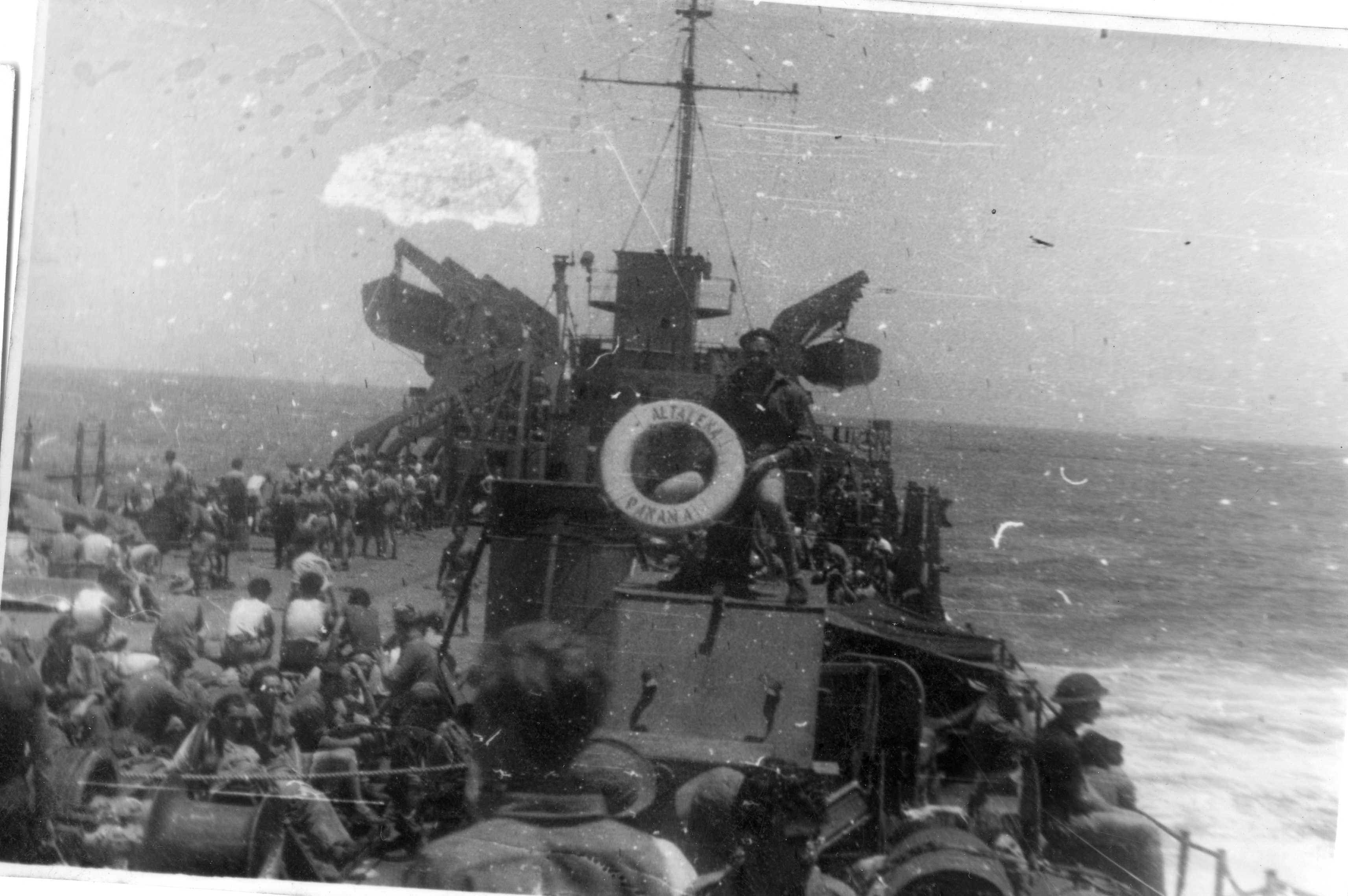 אוסף צחי יפהר, אנשים רבים מאד על האניה אלטלנה